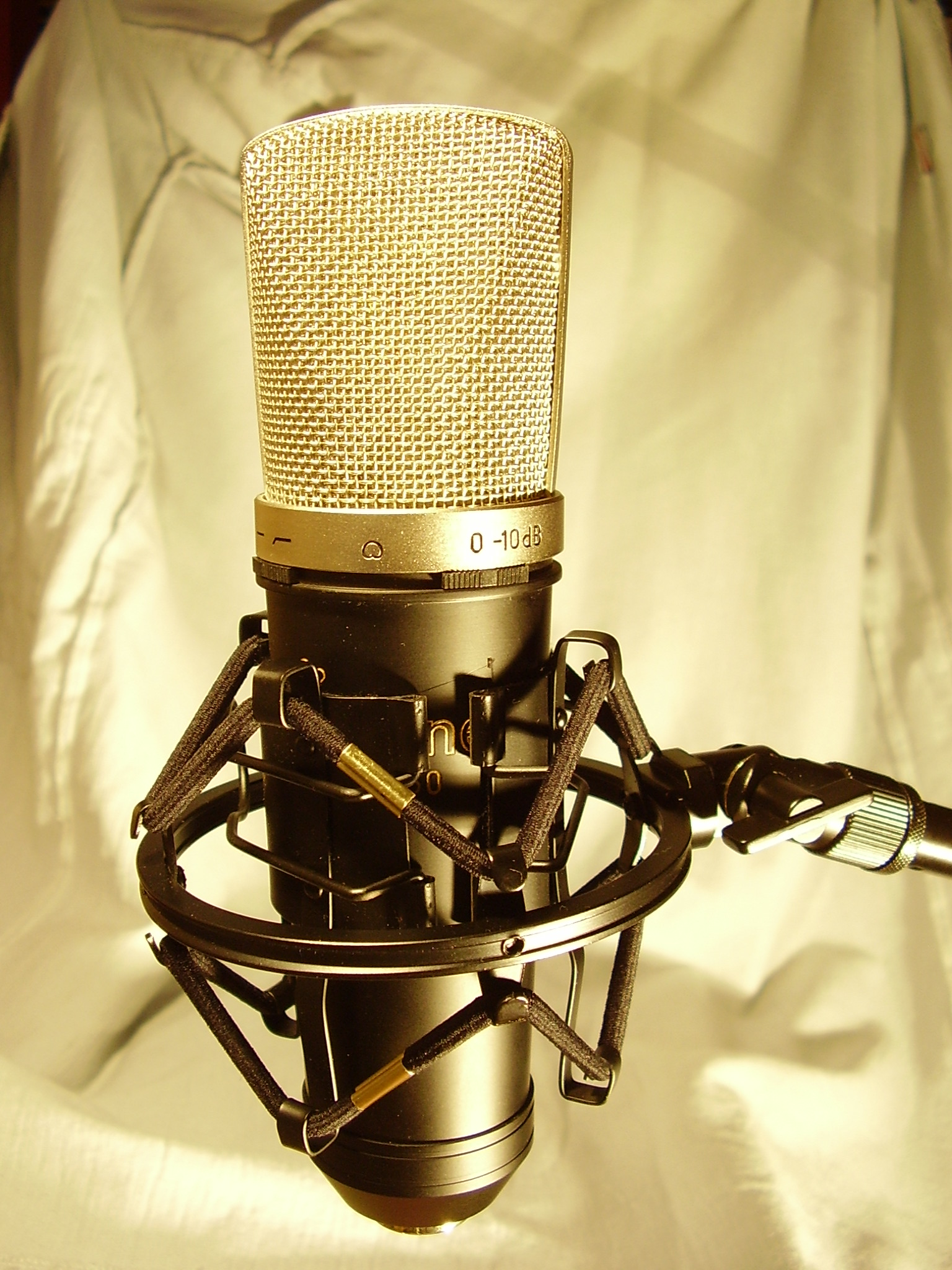 Condenser mikrophone